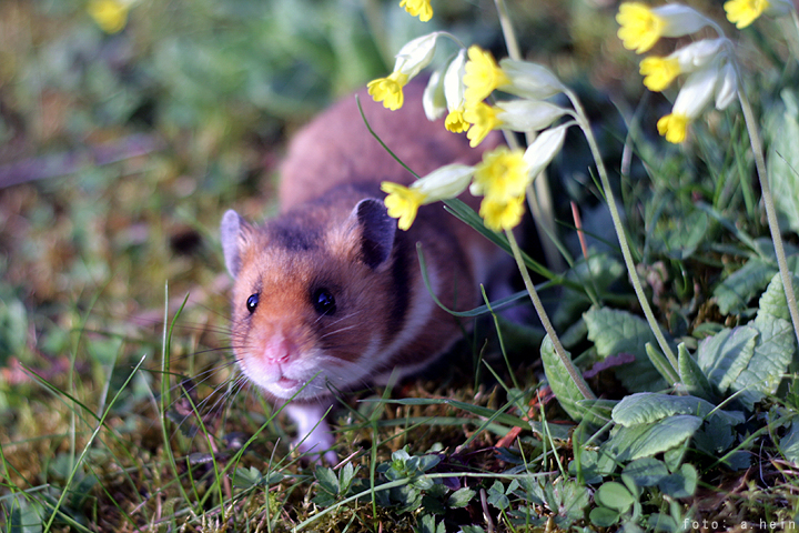 Goldhamster auf der Wiese